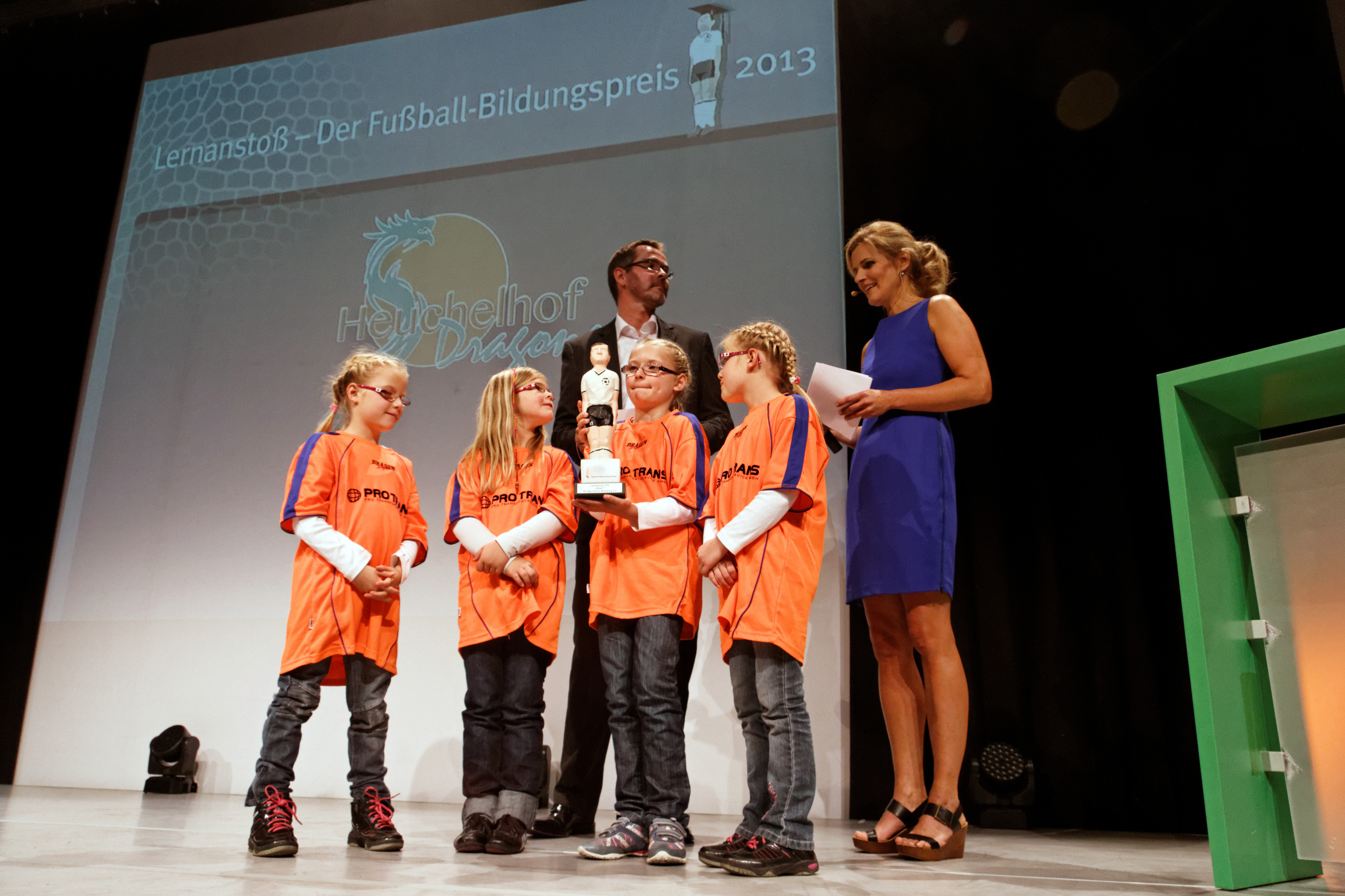 Gala - Verleihung Deutscher Fußball-Kulturpreis 2013, Nürnberg, 25.10.2013, Tafelhalle